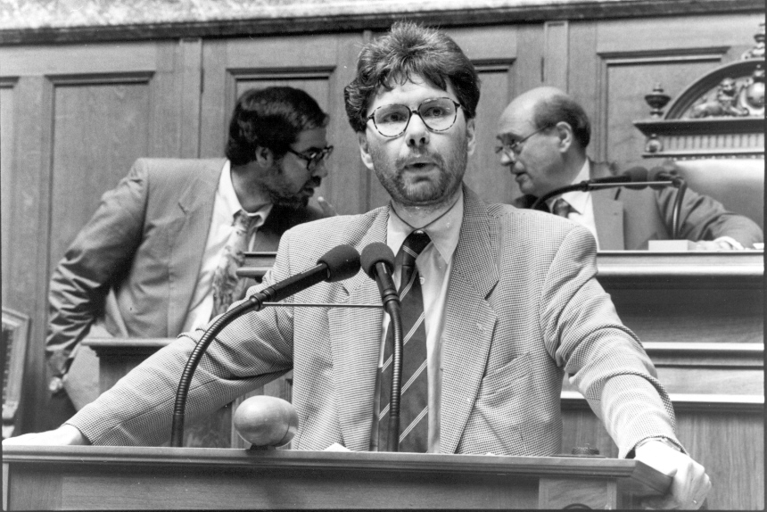 Hanspeter Thür, Schweizer Politiker und Datenschutzbeauftragter; im Foto am Rednerpult im Nationalrat, im Hintergrund links Nationalrat Alexander Tschäppät und rechts Nationalratspräsident Hans-Rudolf Nebiker